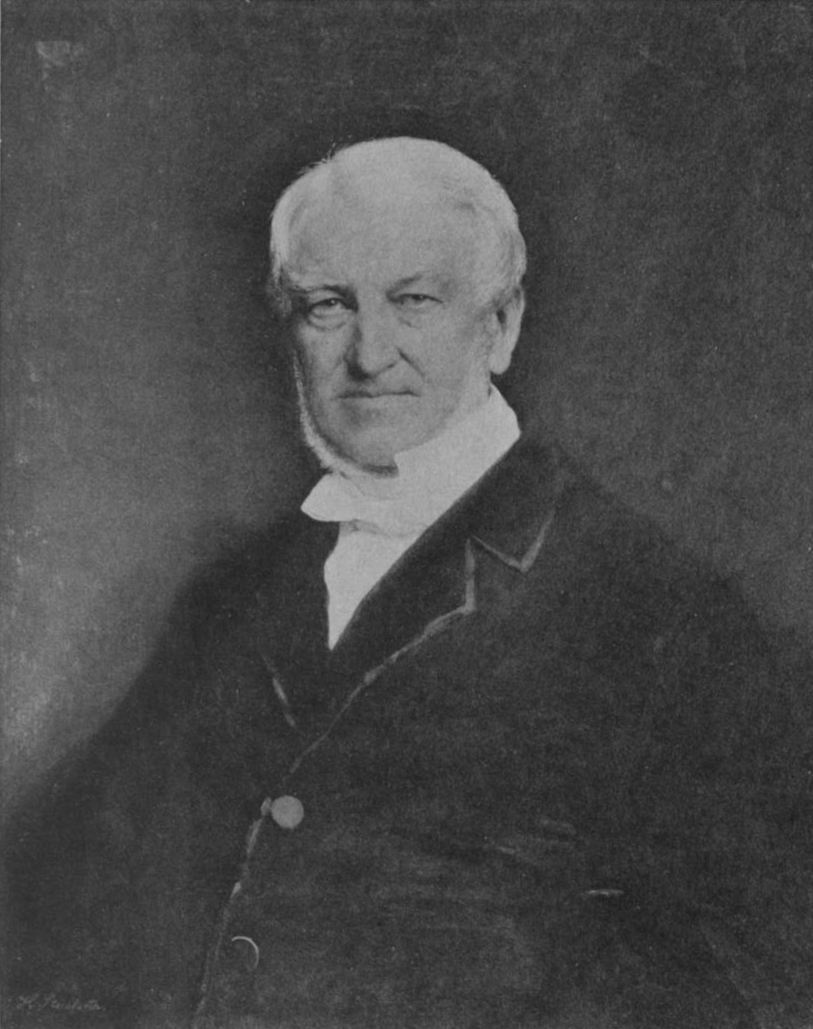 Porträt Johann Friedrich Carl Refardt